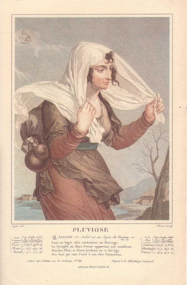 French Revolutionary Calendar PLUVIÔSE 21-22 Janvier: Le Soleil est au signe du Verseau Sous un léger tissu s'achemine au Boccage La Nymphe au doux Nectar apportant son trousseau Bravant Pluie et Hiver, brulante en ce bel âge Des feux qui vont l'unir à son cher Pastoureau